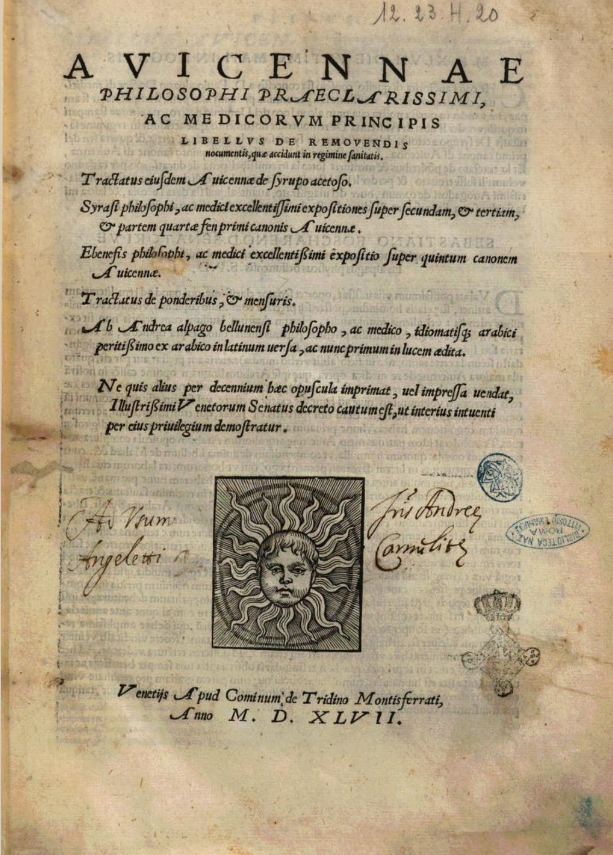 Avicennae aliorumque opera ab Andrea Alpago Latine versa 1547 title page